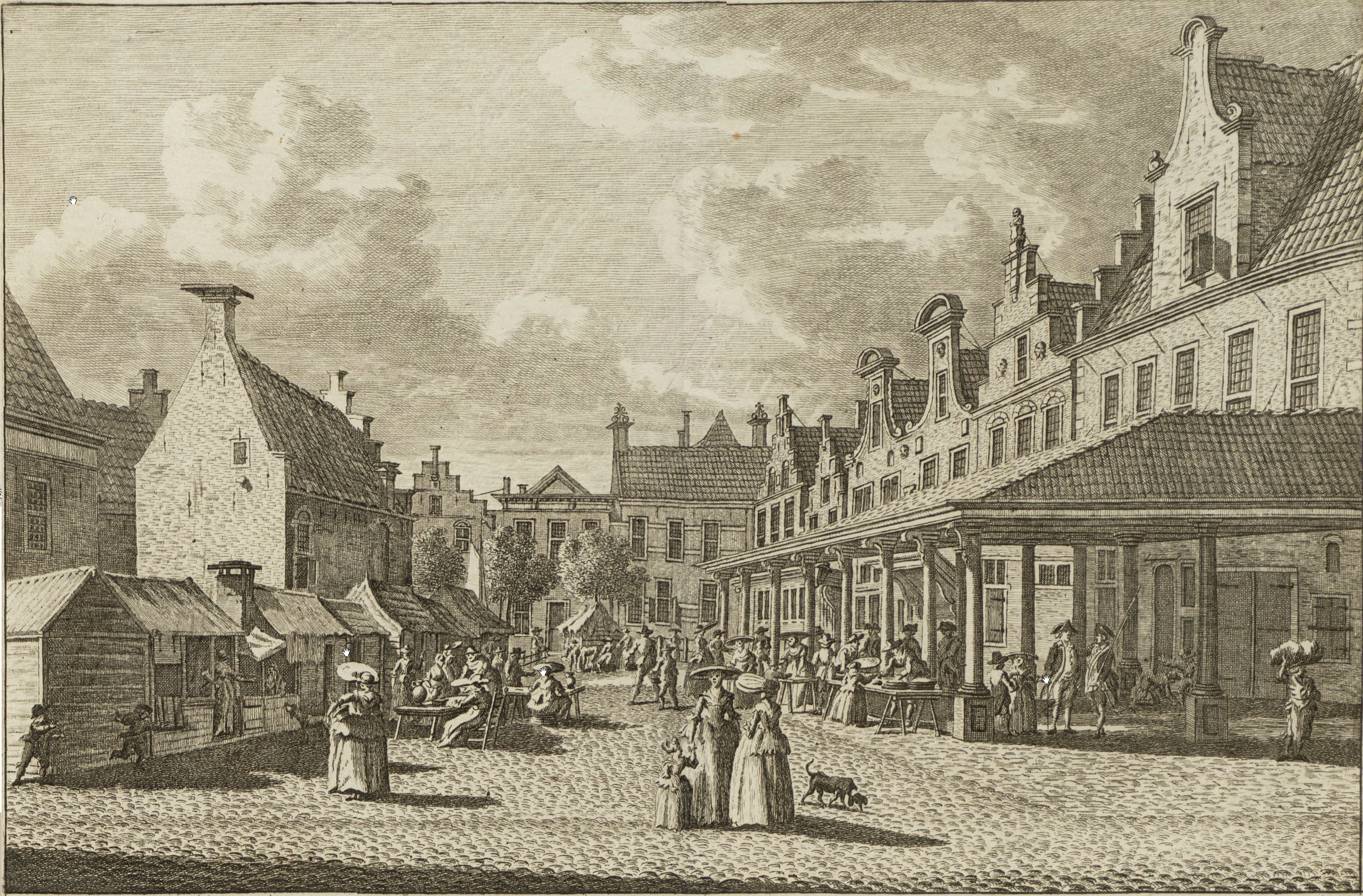 Kopergravure. Gezicht op de Waag te Sneek.